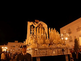 Soledad de Chiclana